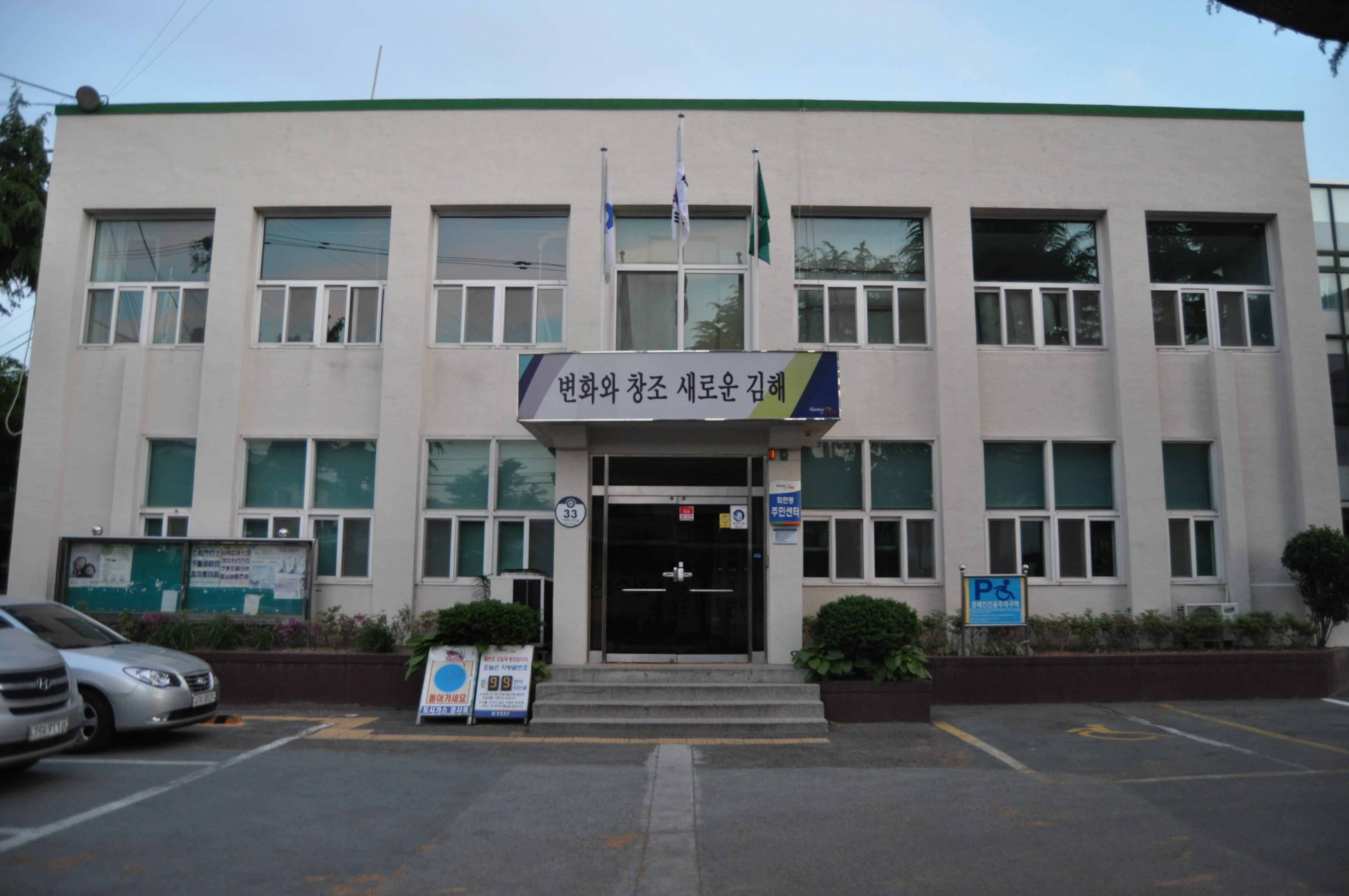 김해시 봉황동 301-3 (가락로63번길 33) 소재, 회현동 주민자치센터